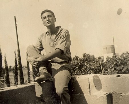 אליהו בנימיני כחקלאי צעיר. רמת השרון, 1931